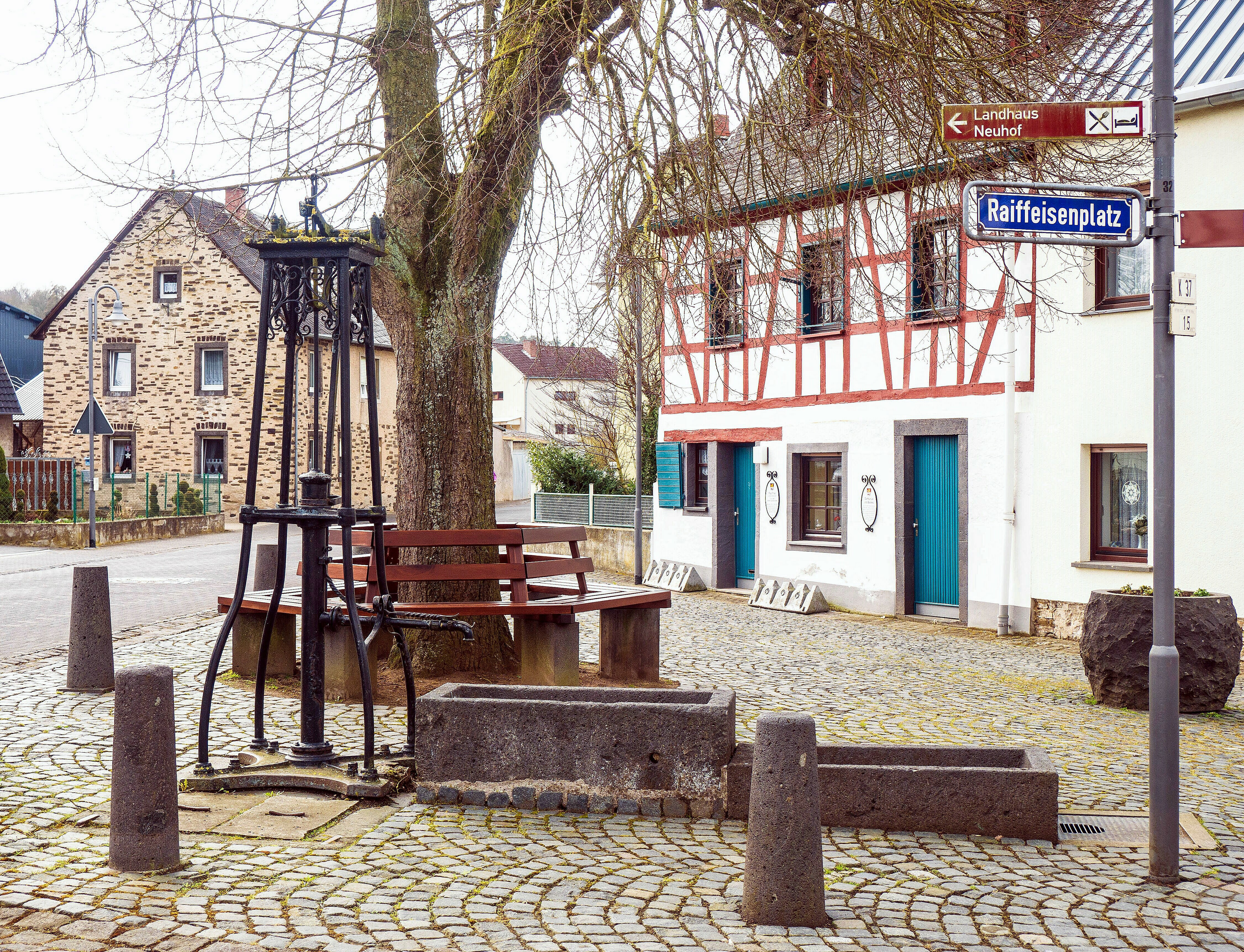 Dorfplatz mit gusseiserner Schwengelpumpe und zwei Basaltbrunnenbecken